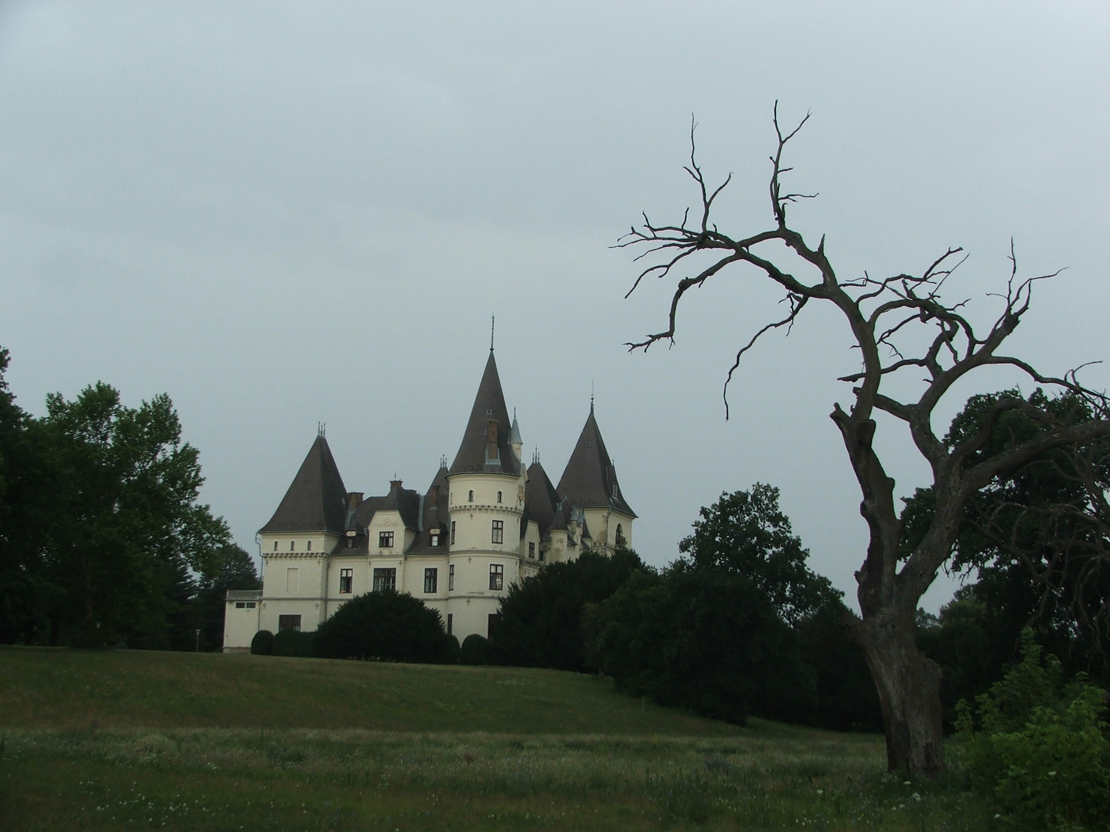 Tiszadob, Andrássy-kastély, holtág felöl.